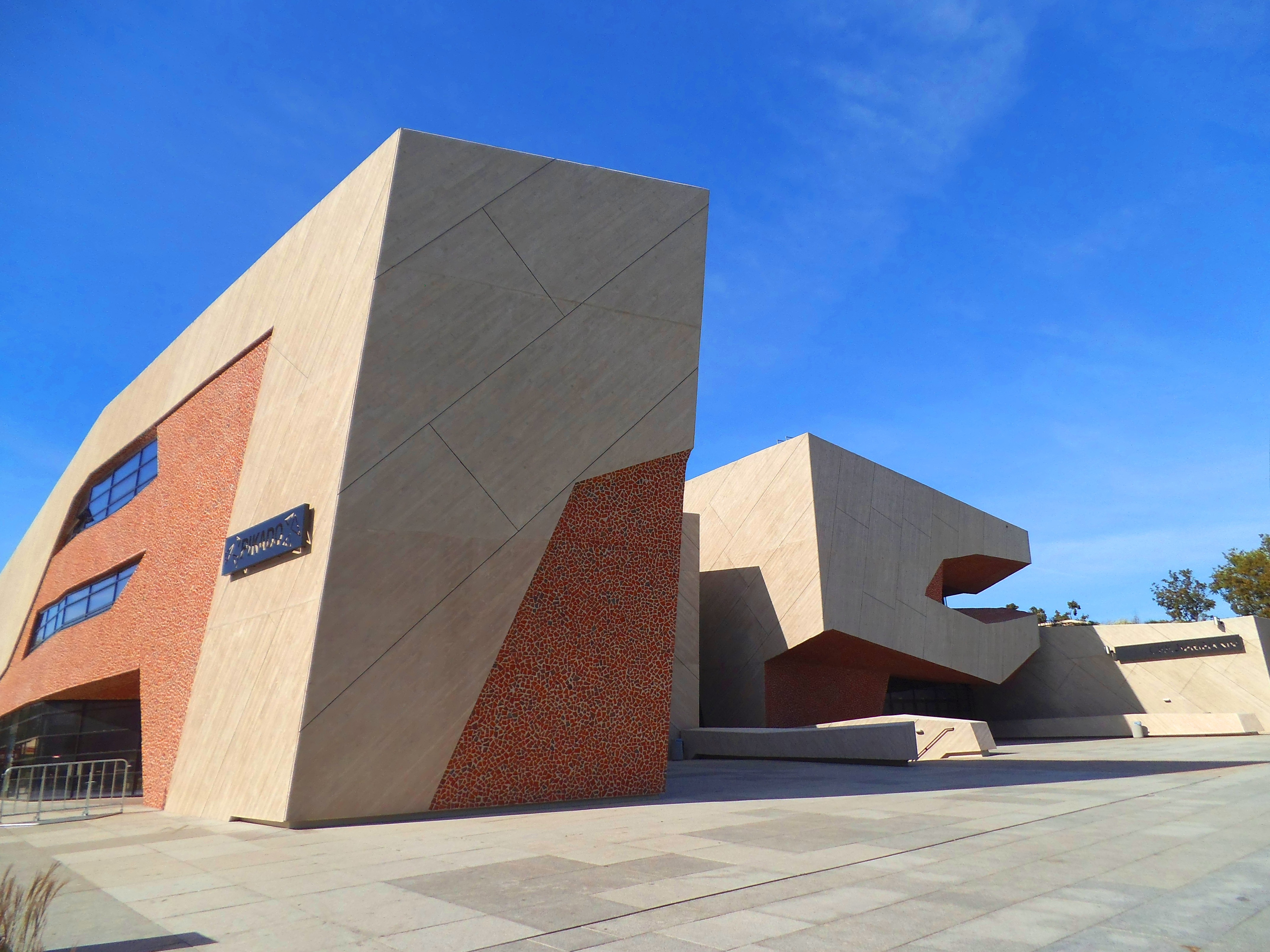 Centrum Kulturalno-Kongresowe Jordanki w Toruniu92